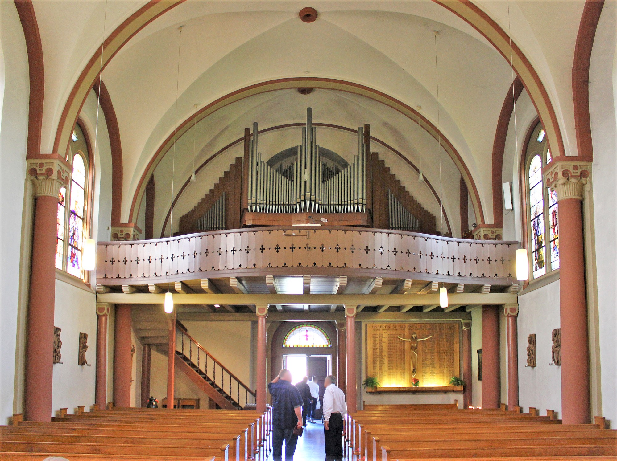 Blick ins Innere der kath. Kirche St. Laurentius in Wolfersweiler, Gemeinde Nohfelden, Landkreis St. Wendel, Saarland